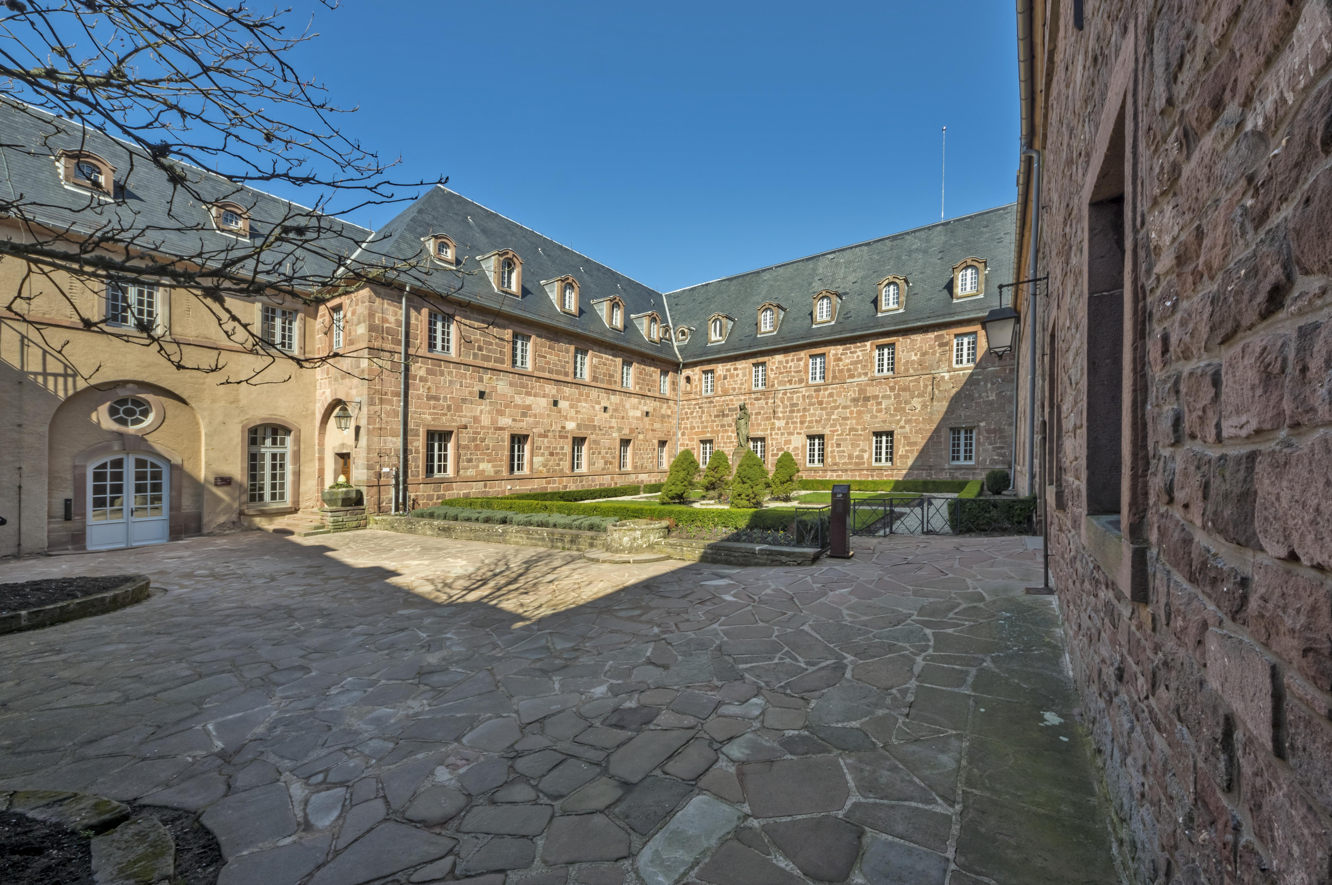 Bilder vom Le Mont ste. Odile (Odilienberg im Elsaß) Der innere Klosterhof